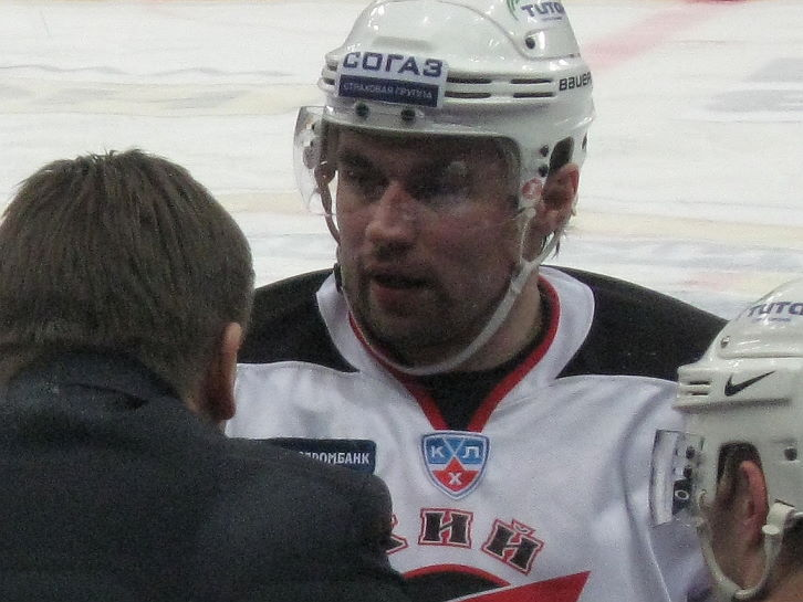 На игре чемпионата КХЛ СКА-Авангард (29.11.2010).